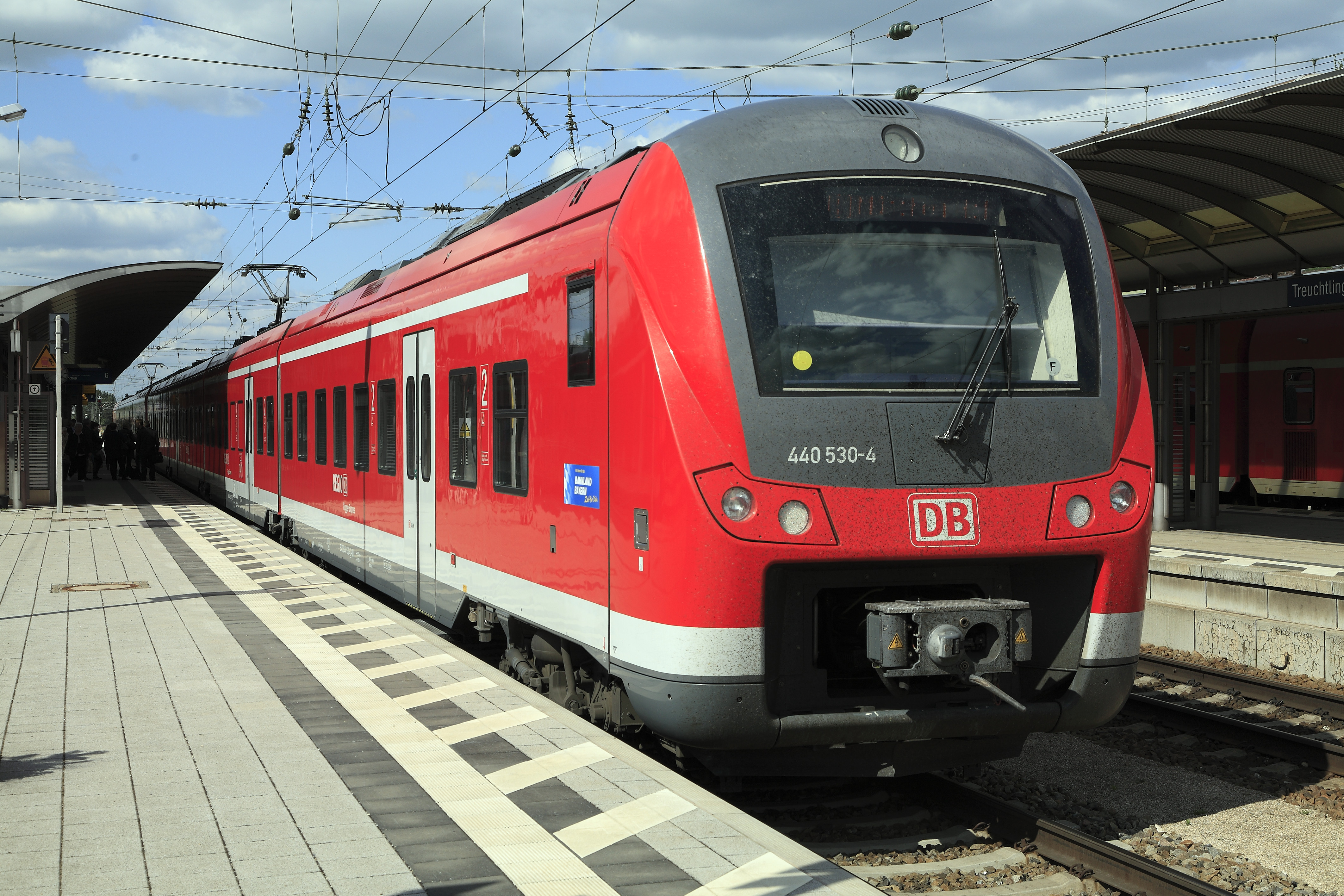 Eilzug Richtung Augsburg, »Alstom Coradia Continental«, ohne derartige Markennamen machen es die Hersteller heute nicht mehr.